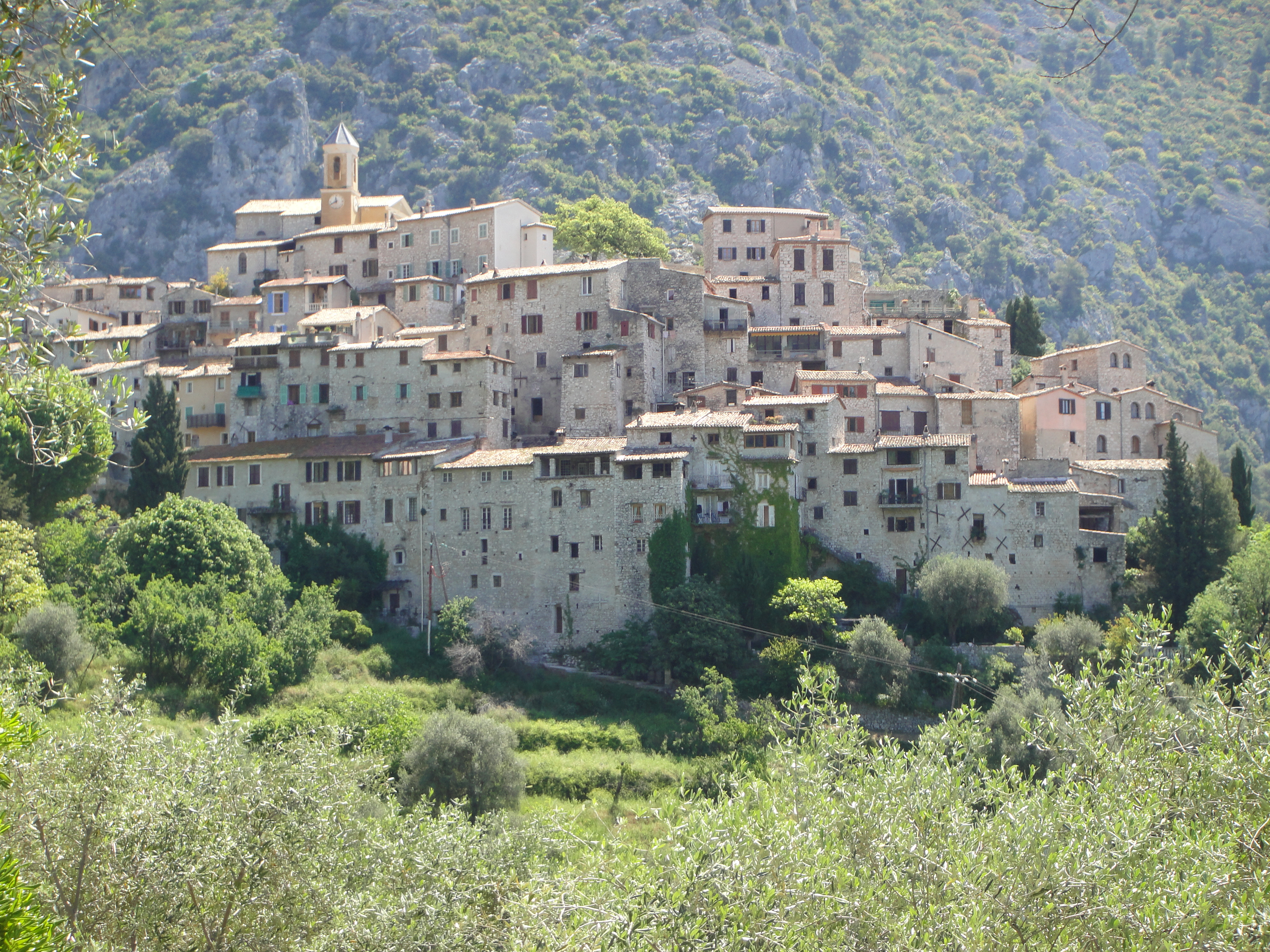 Peillon